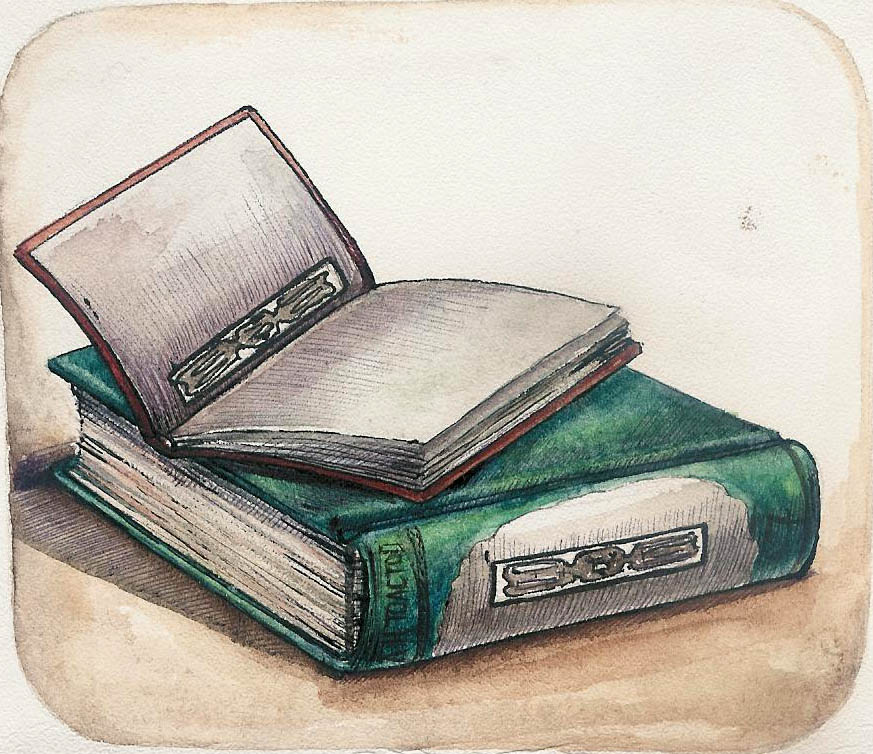 rfid in book